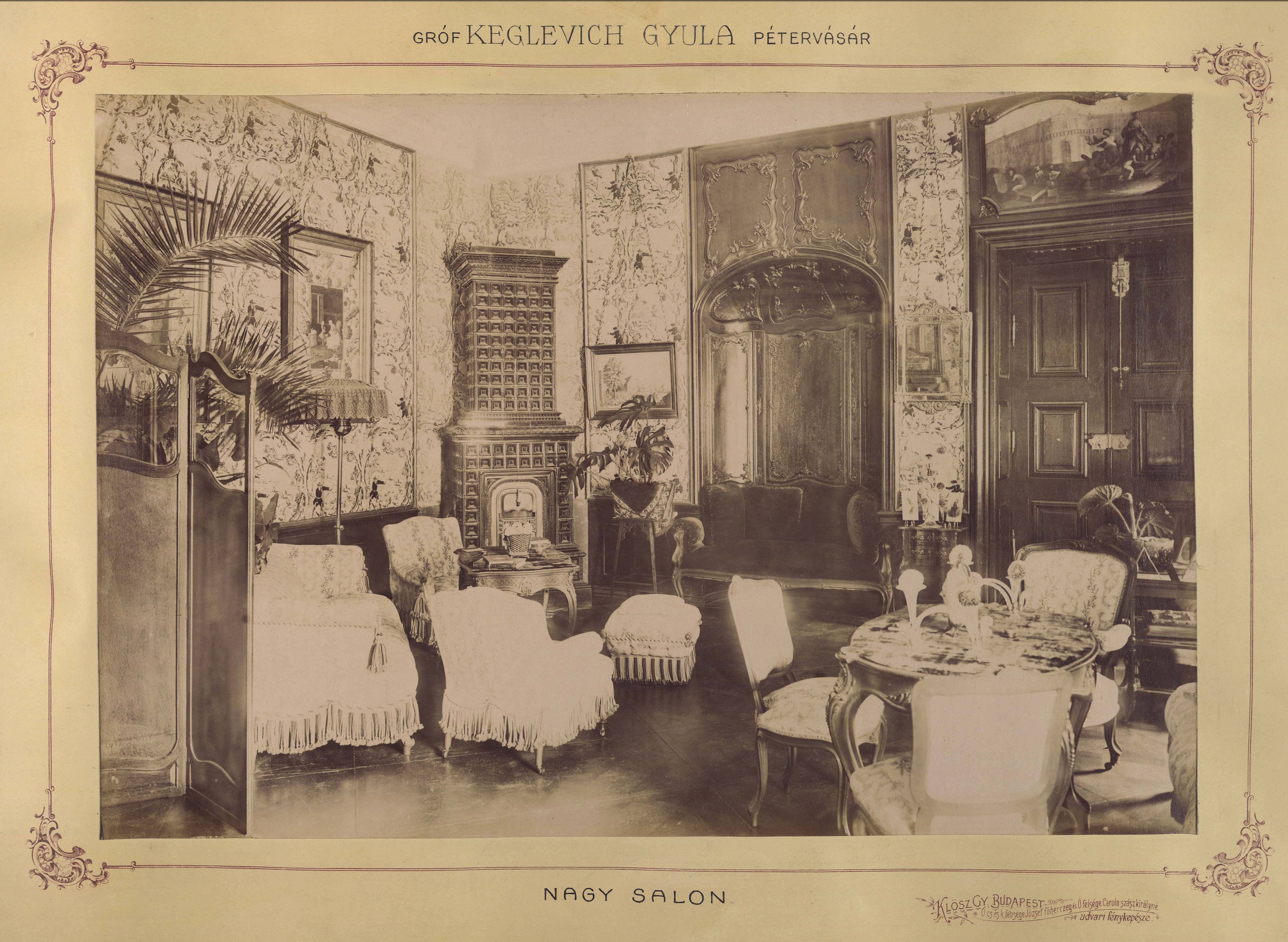 gróf Keglevich Gyula kastélyának nagyszalonja. A felvétel 1895-1899 között készült. A kép forrását kérjük így adja meg: Fortepan / Budapest Főváros Levéltára. Levéltári jelzet: HU.BFL.XV.19.d.1.12.053 Location: Hungary Tags: interior, tile stove, folding screen, floor lamp